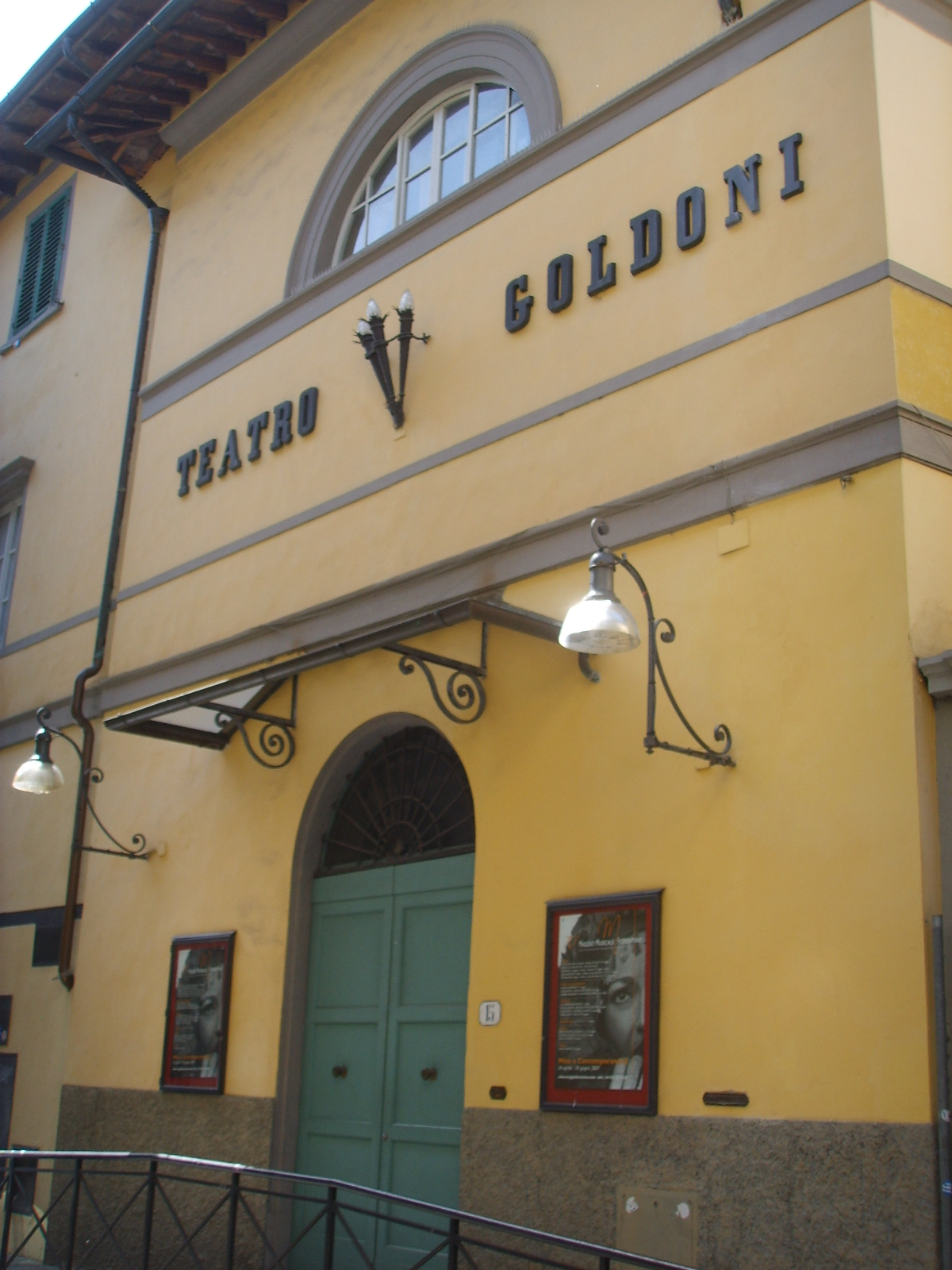 Teatro goldoni firenze